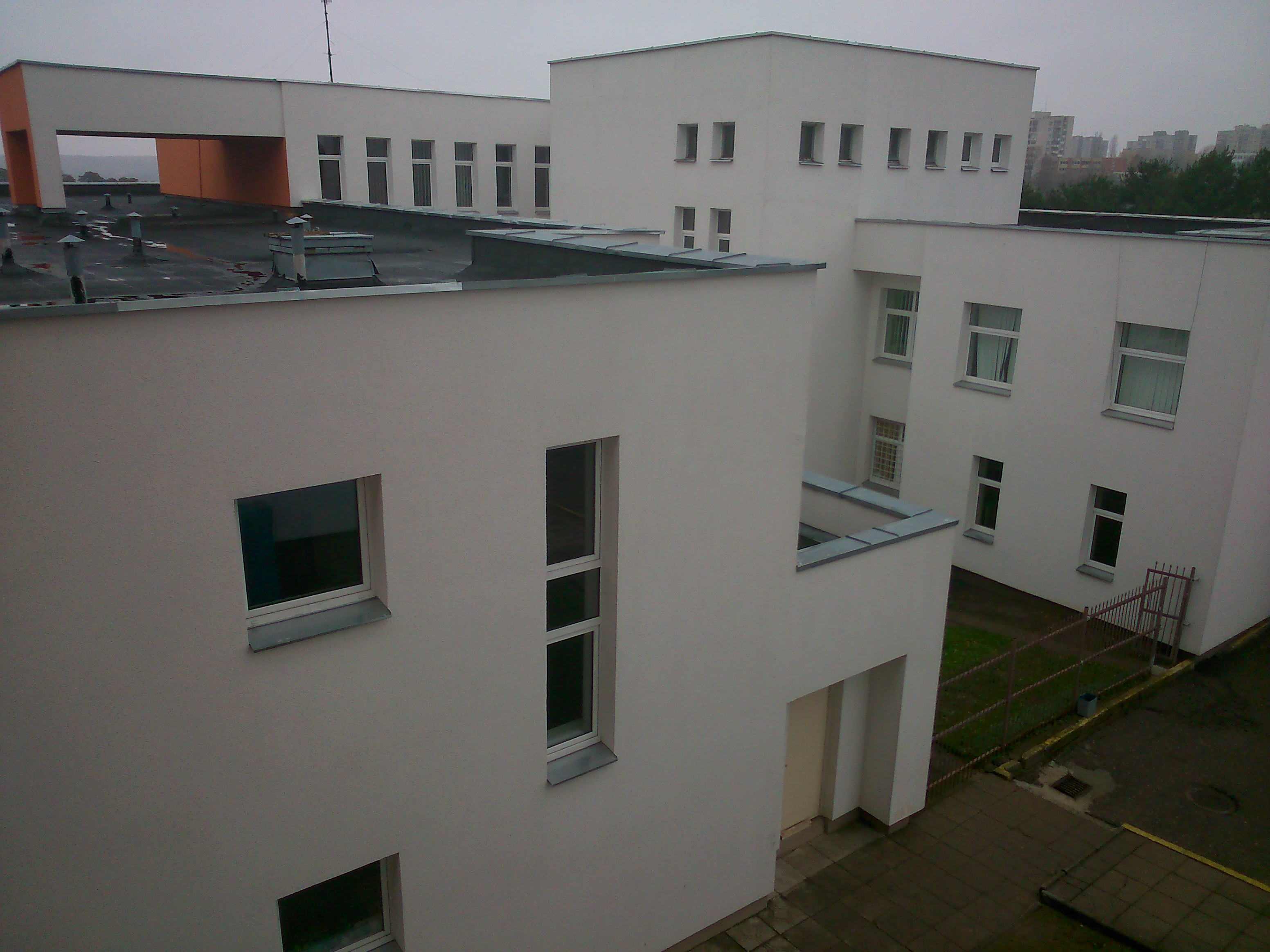 Konsultacinė poliklinika